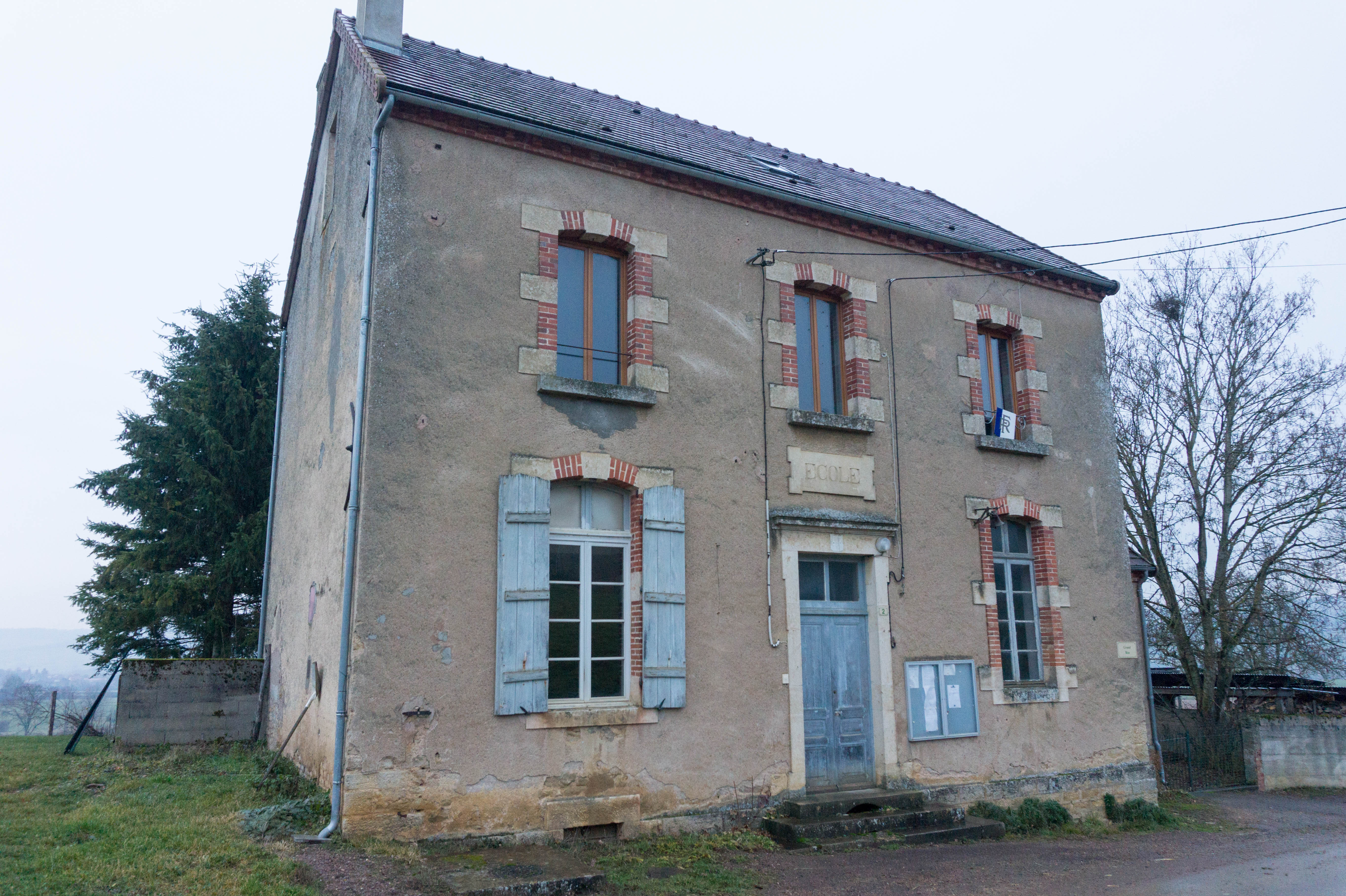 Ancienne école et actuelle mairie de Vesvres